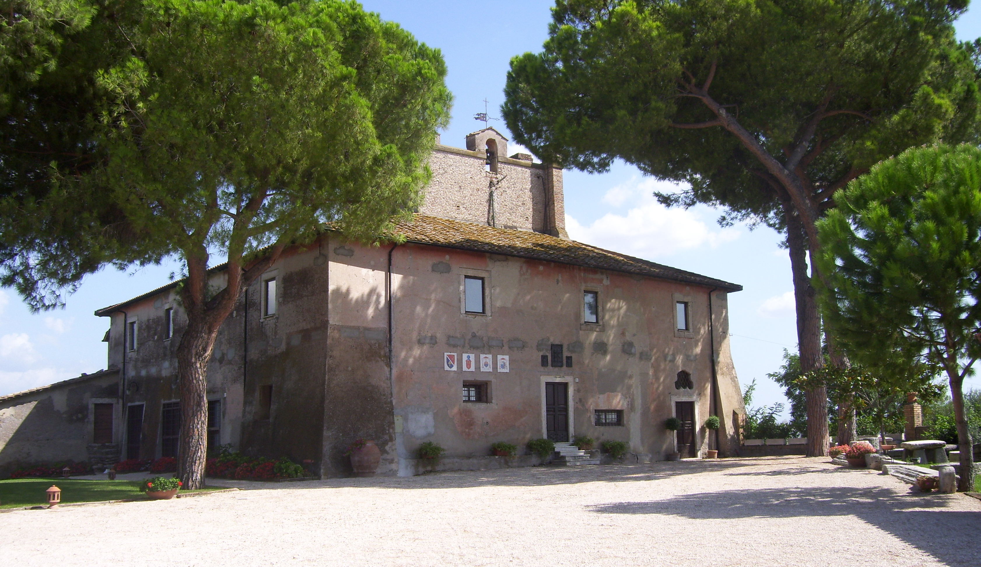 Casale Tor de' Sordi, Guidonia.